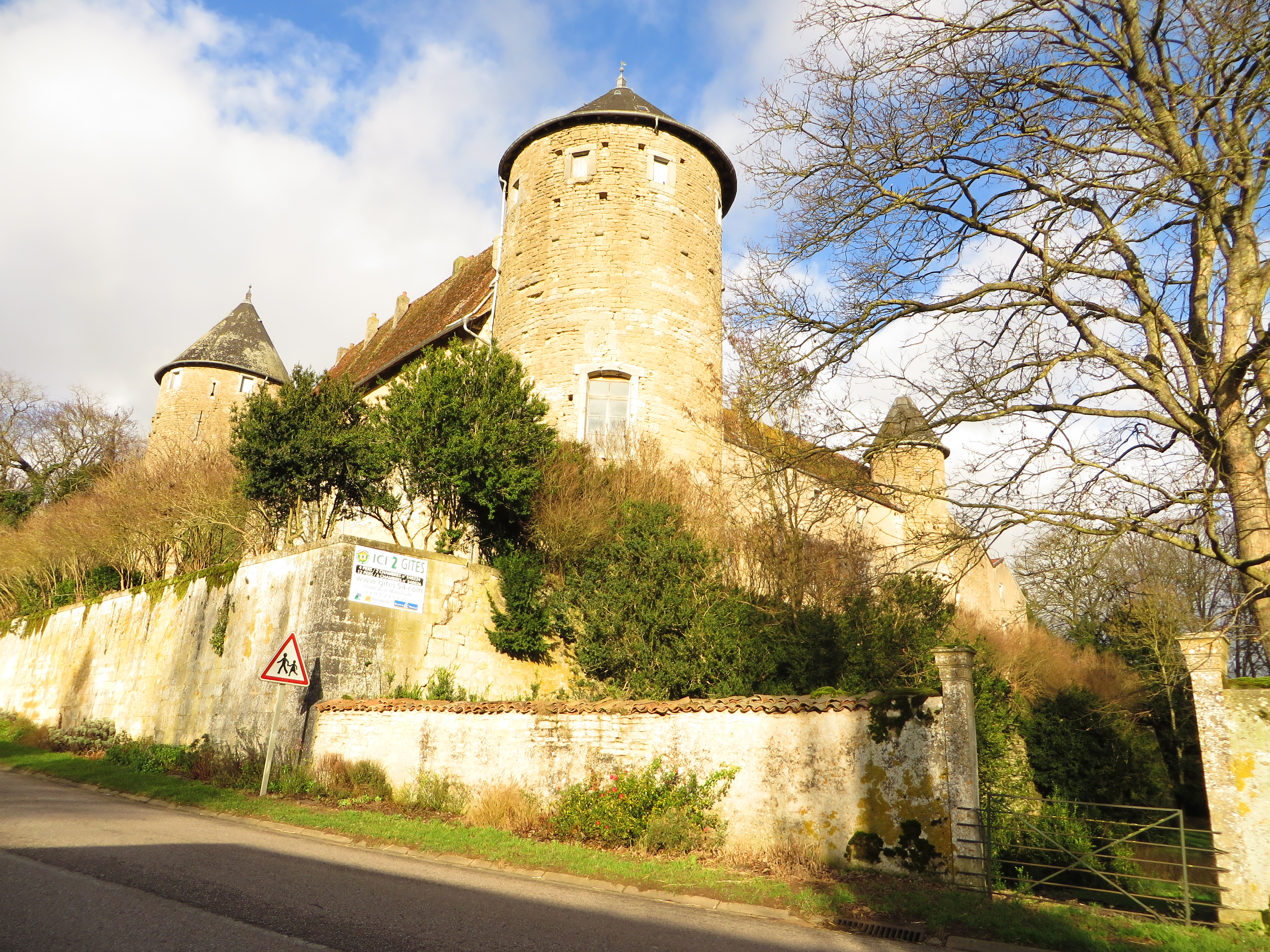 Manonville chateau